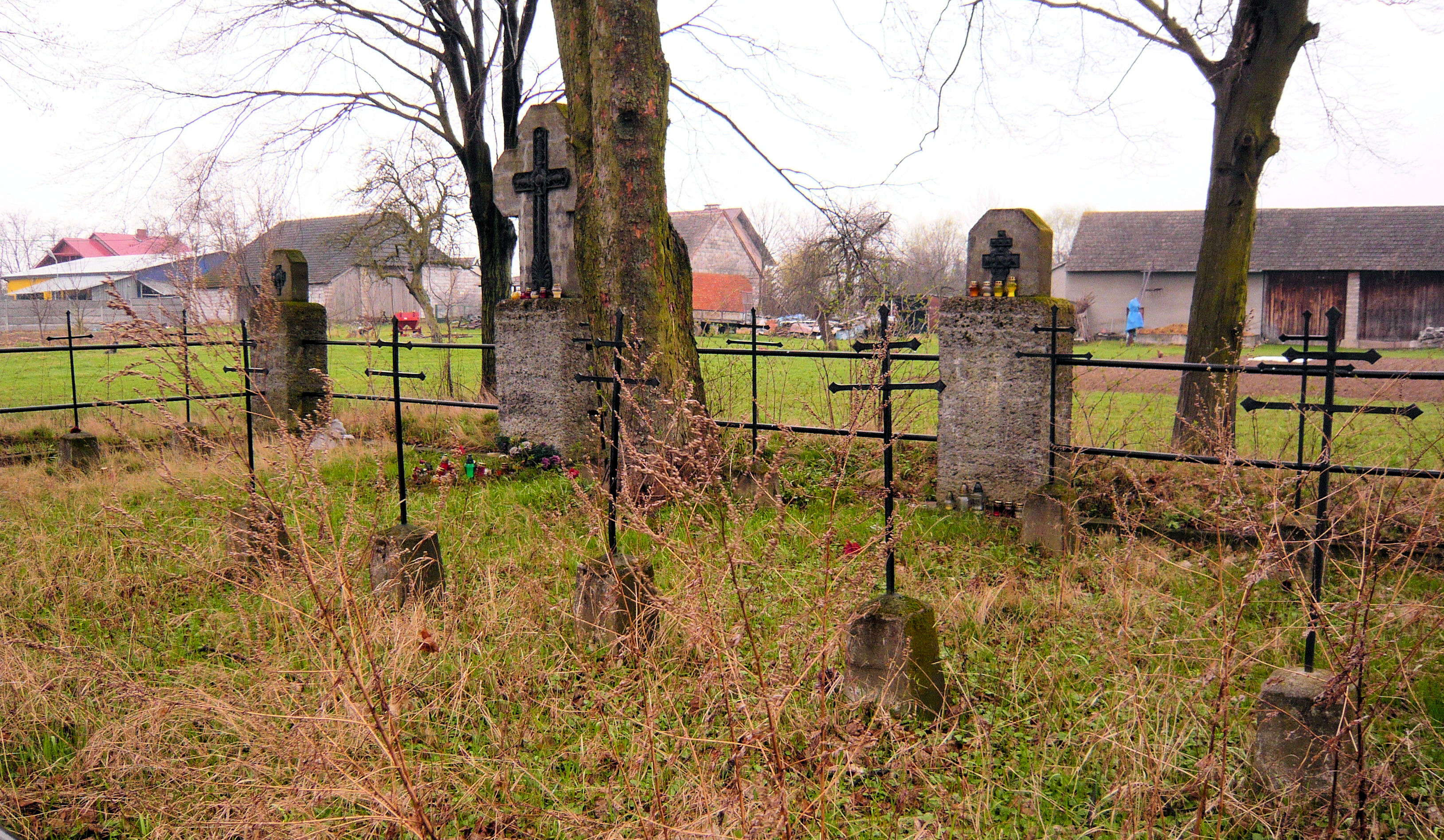 Cmentarz wojenny 317 Bogucice IX okręg Bochnia